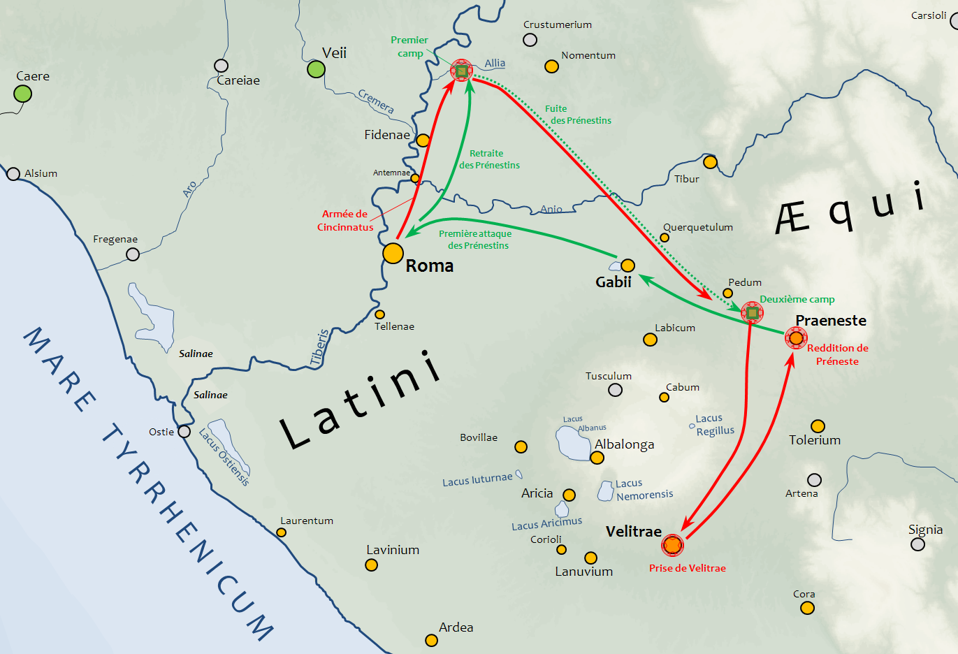 Carte des mouvements de troupes lors de la guerre entre Rome et Préneste (380 av. J.-C.)